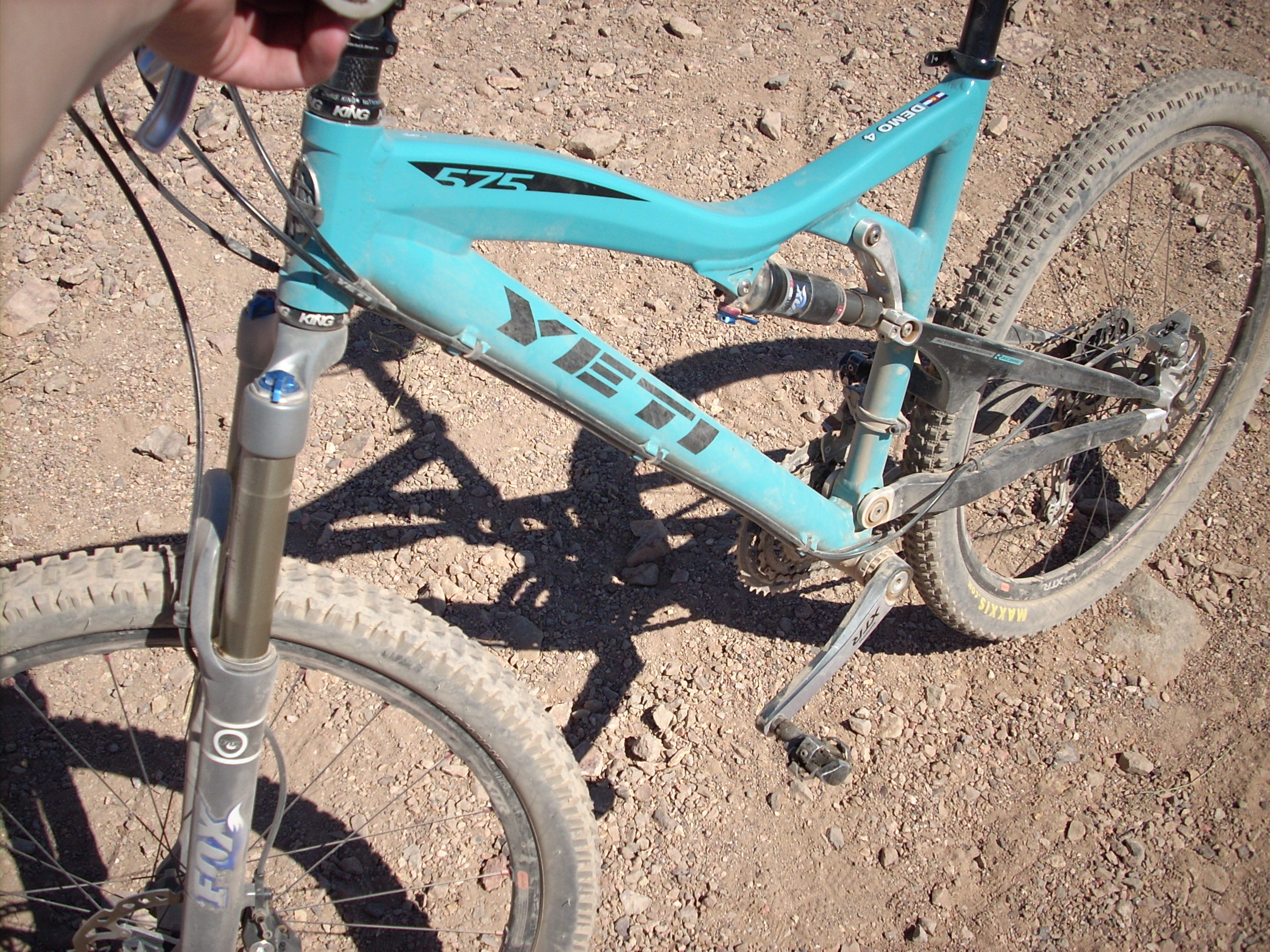 Yeti 575